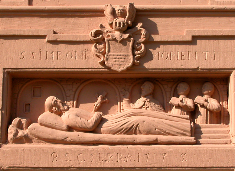 High relief of St. Simeon, Trier ru: Рельеф святого Симеона на стене музея у ворот Порта Нигра (Трир)